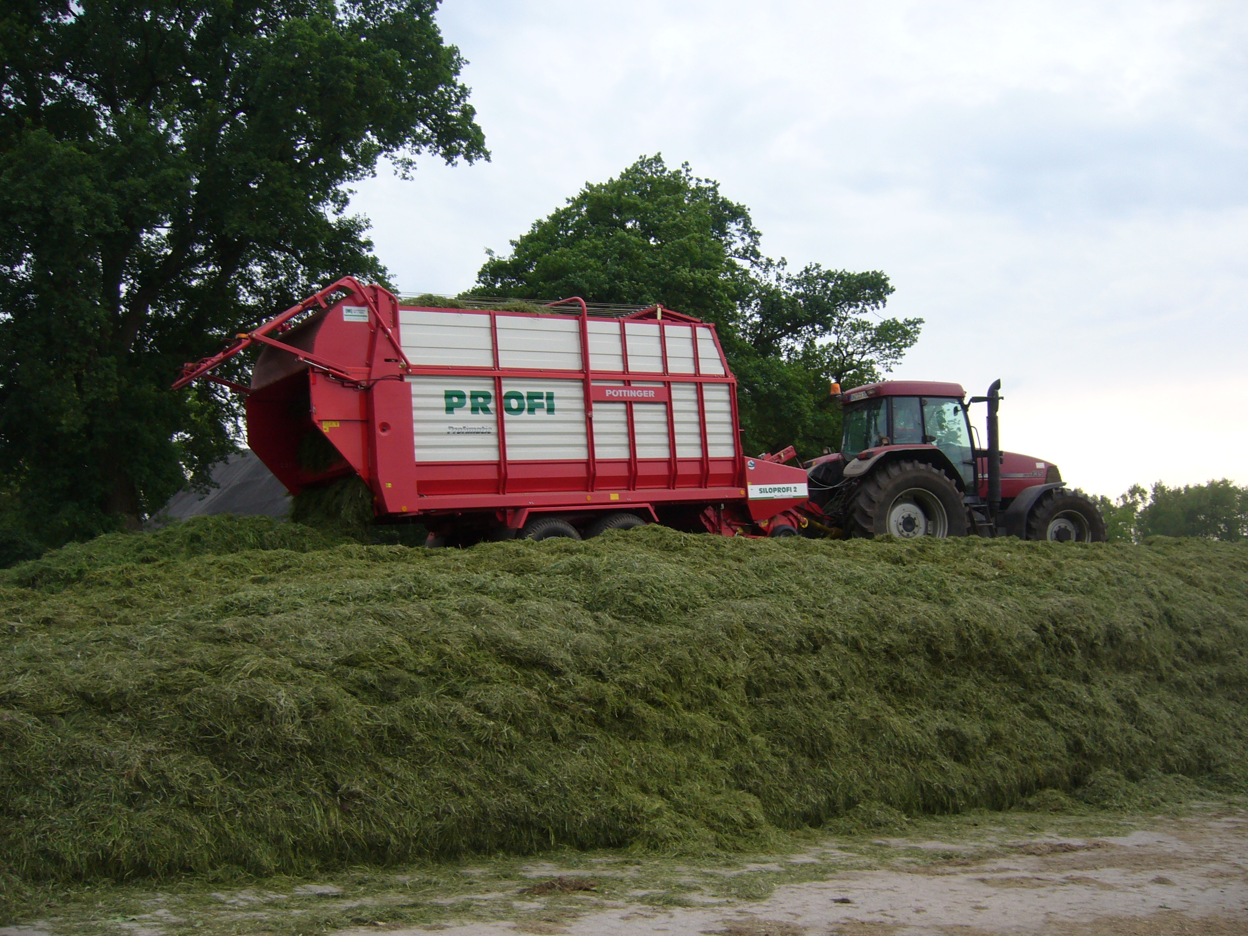 Case-IH-Traktor MX 135 mit Pöttinger-Ladewagen Siloprofi 2 beim Grasschnitt-Abladen auf einem Fahrsilo